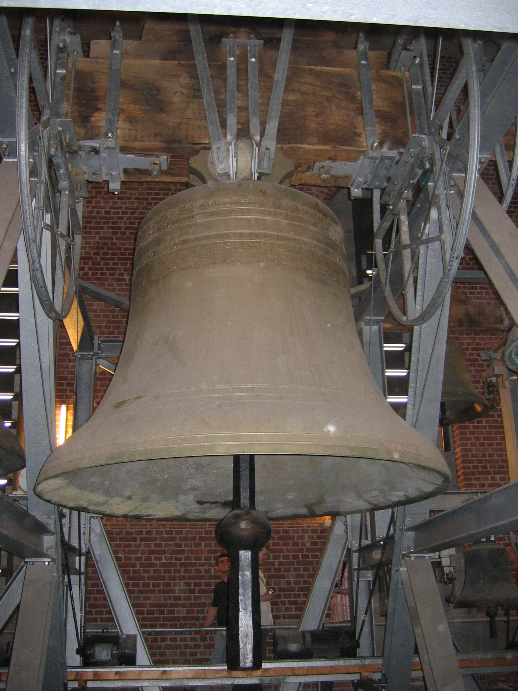 Bourdon. St. Kunibert zu Köln.